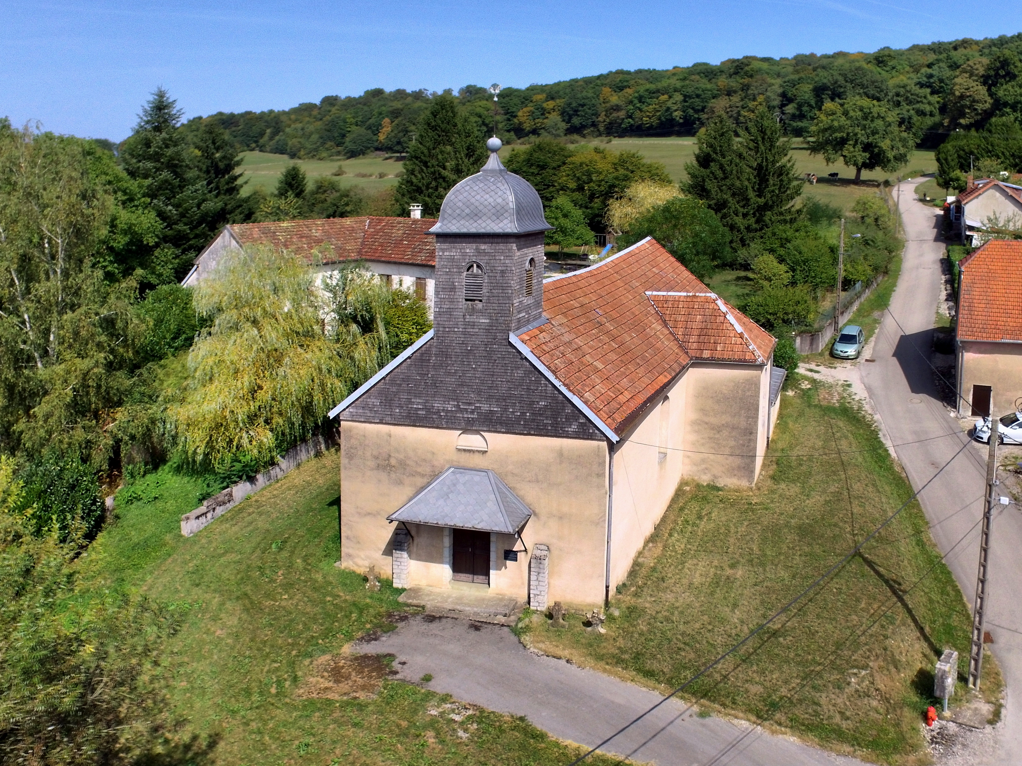 L'église